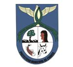 Brasão Chaves